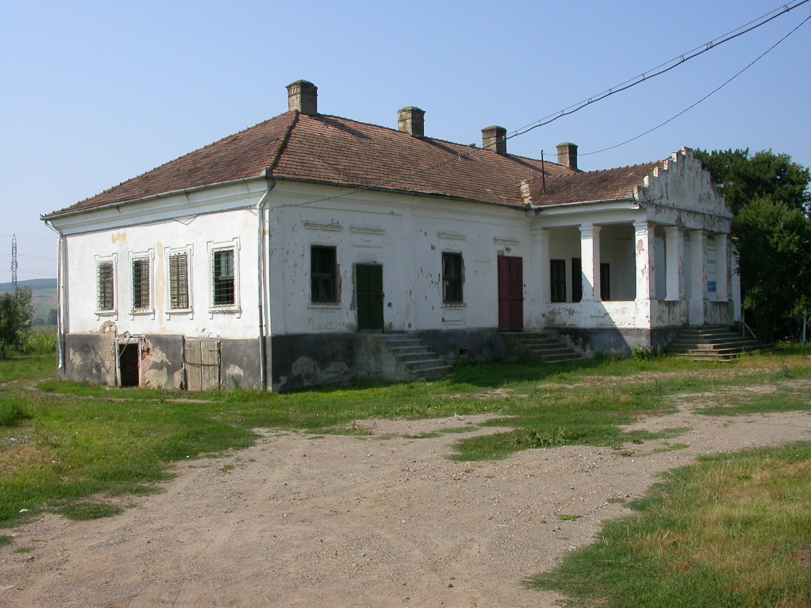 Castelul Apor, 1775 - 1830